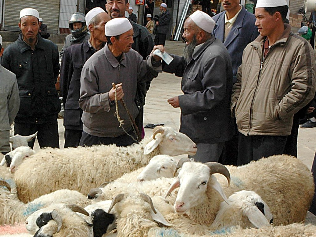 Haggling